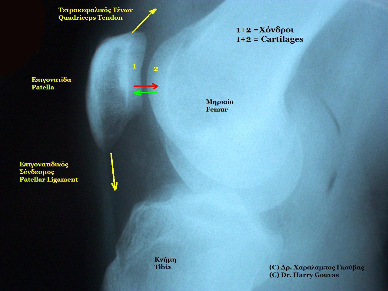 Knee xray